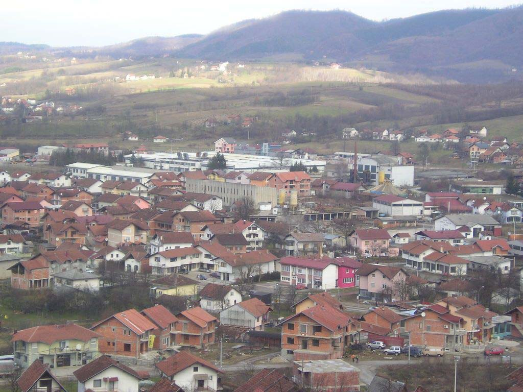 поглед на Челинац са брда